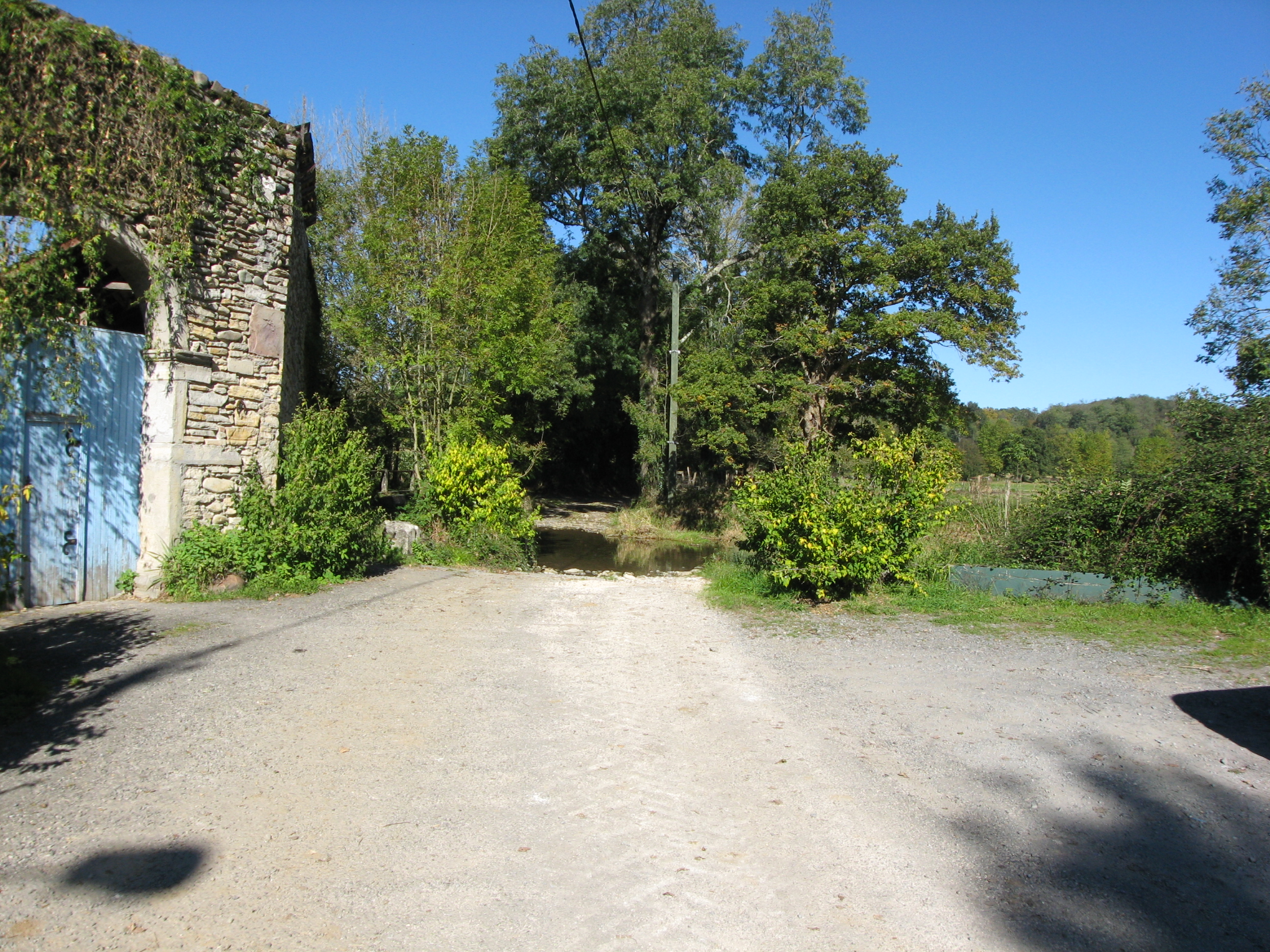 Gué sur l'Escou prés du château Bazerques de Précilhon Pyrénées).